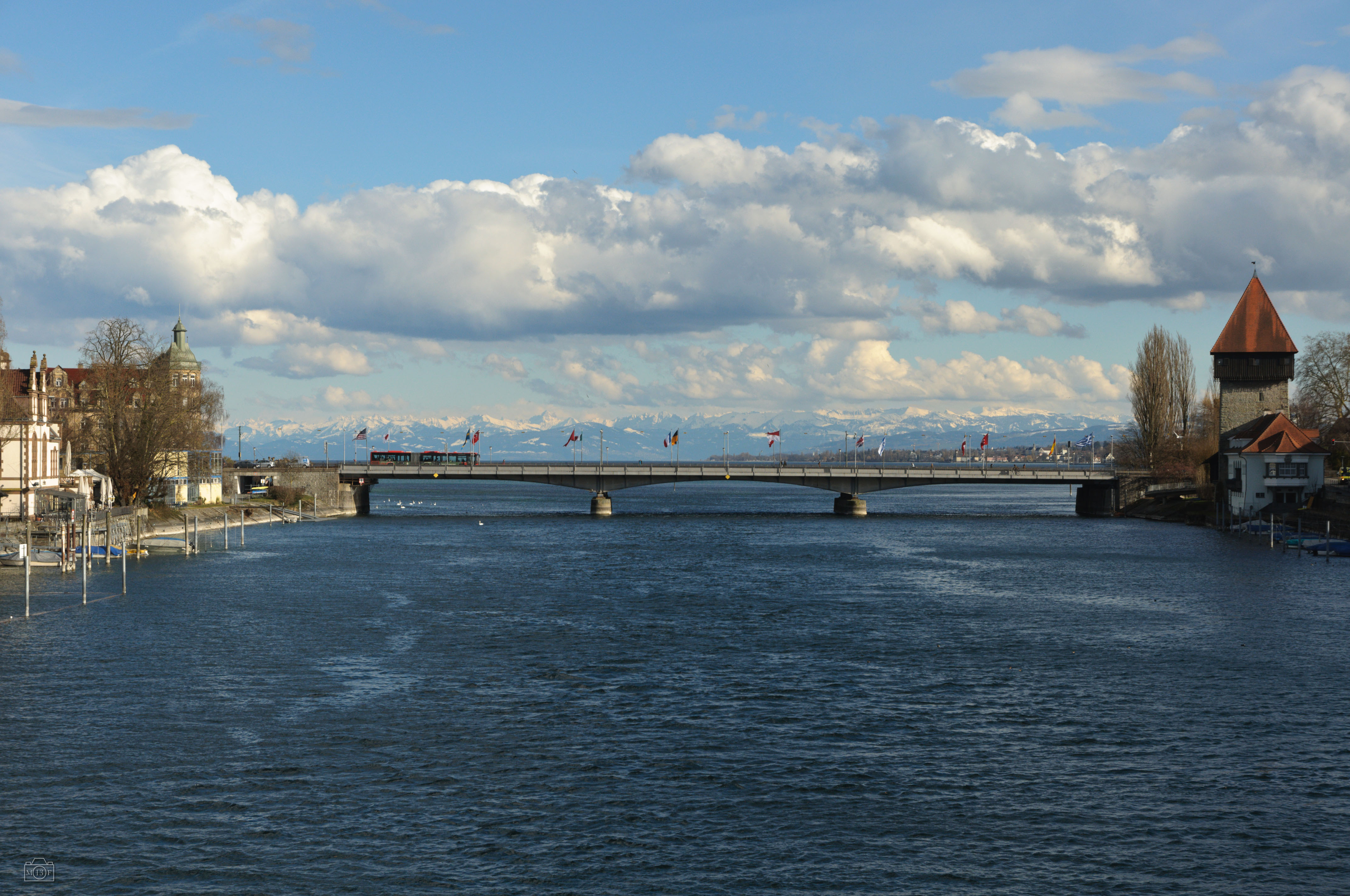 Blick von der Fahrradbrücke auf die kombinierte Eisenbahn/Straßenbrücke über den Seerhein in Konstanz, rechts der Rheintorturm. Dahinter die Österreichischen Alpen bei Bregenz